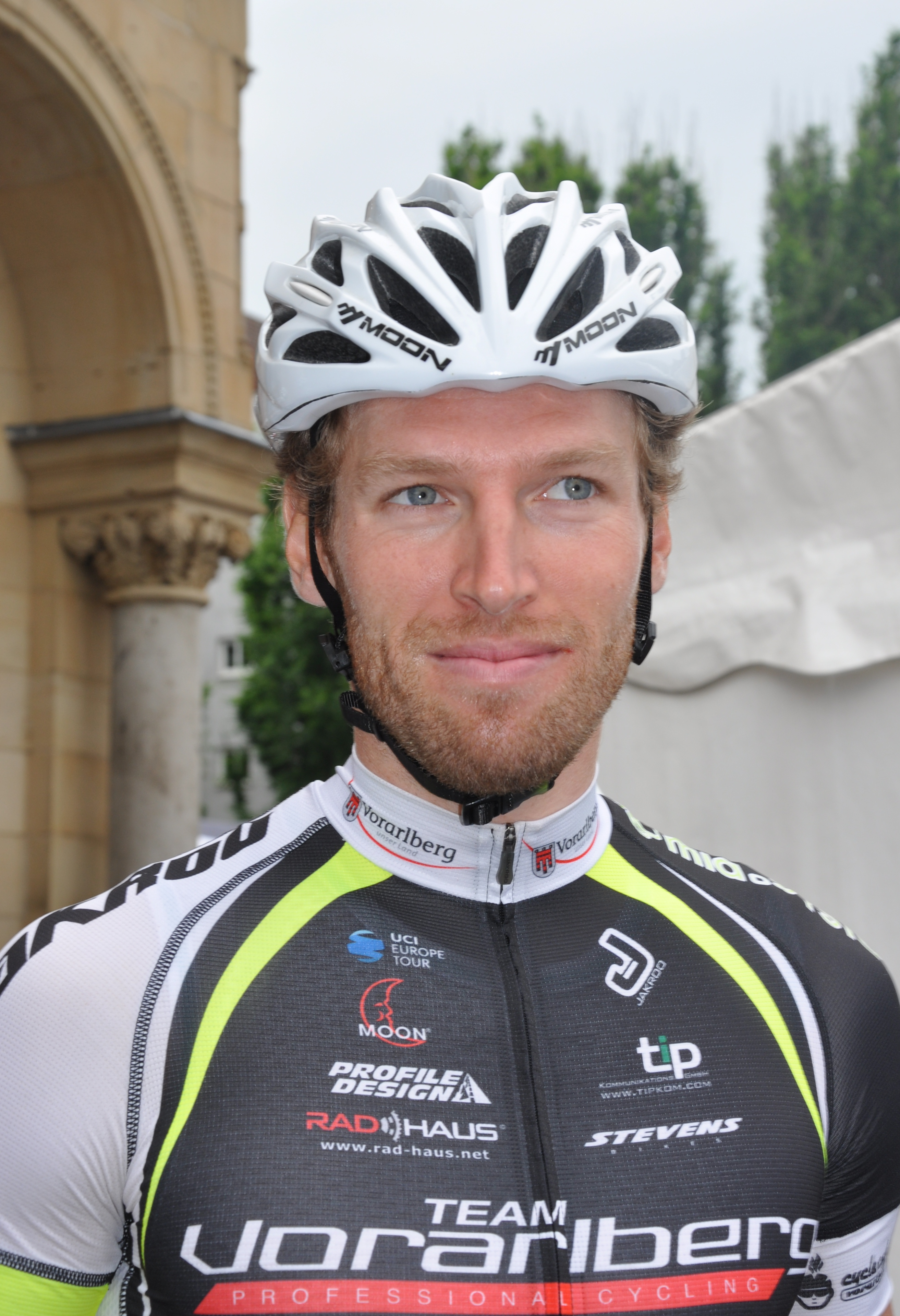 Zsolt Dér, ungarischer Radrennfahrer